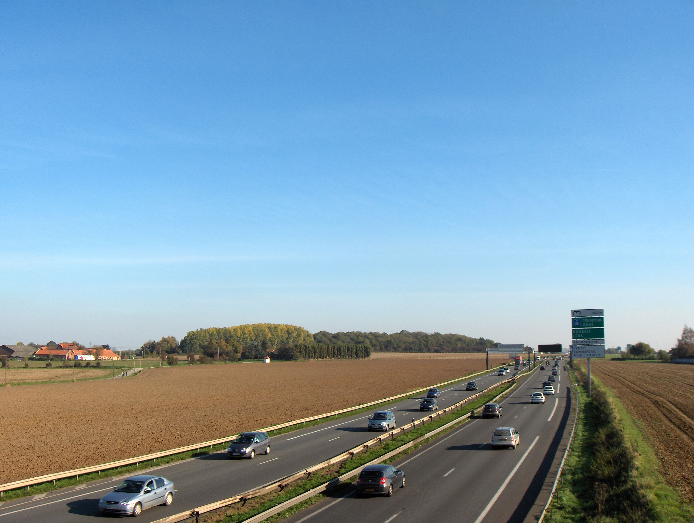 Autoroute A25 (France, dept. Nord), à la hauteur de Ennetières-en-Weppes, vue vers le nord.